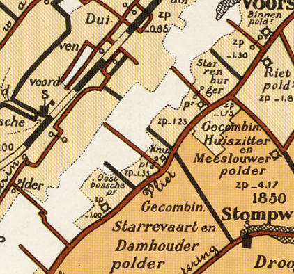 Knippolder